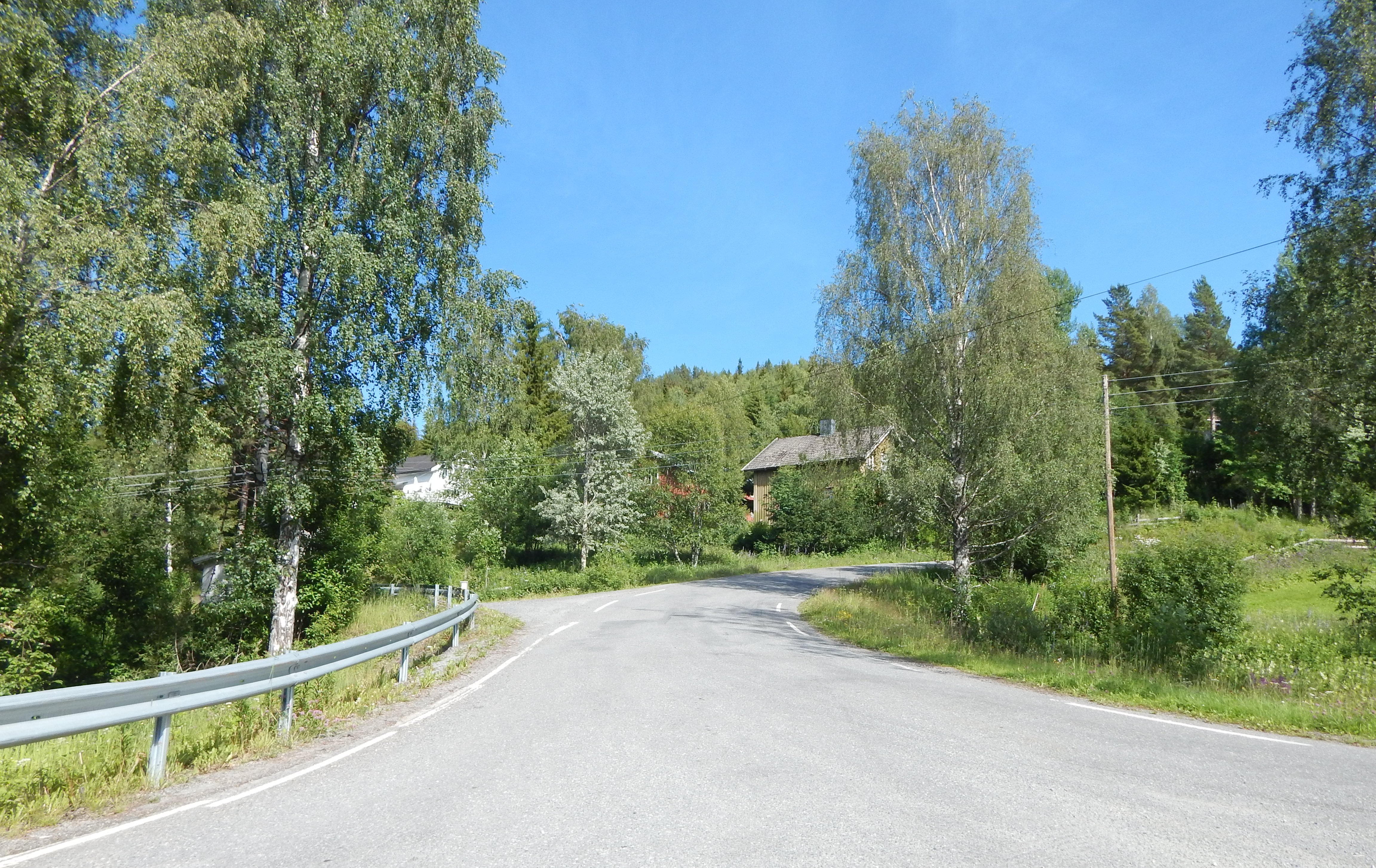 Ellevesætervegen (fylkesvei 1780, tidl. FV92 i Hedmark)